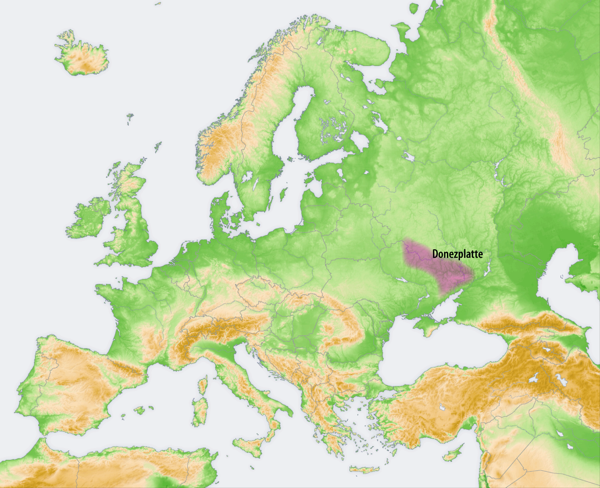 Landschaften der Osteuropäischen Ebene: Donezplatte